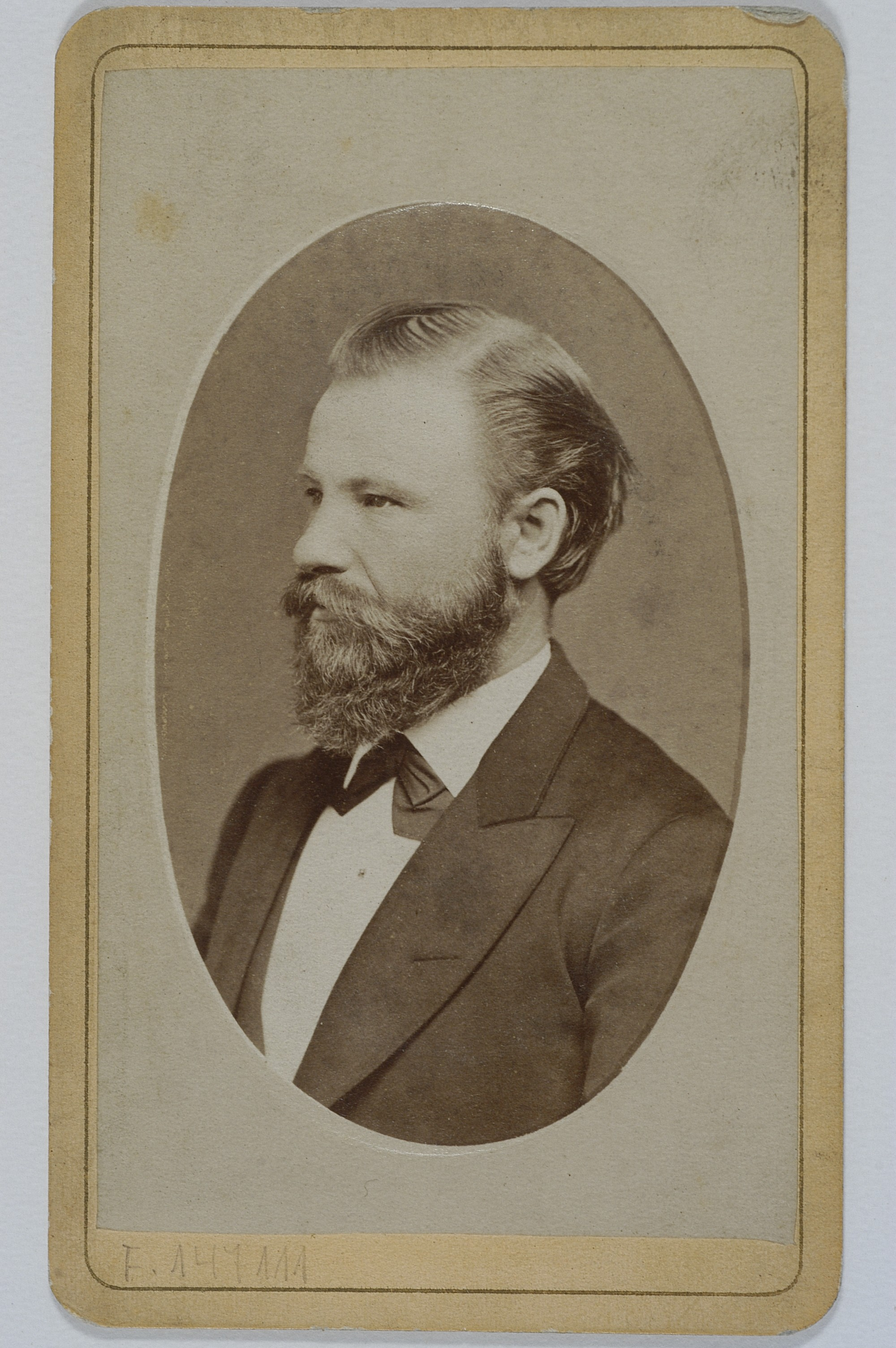 Portret lekarza Władysława Pawlickiego, ok. 1873 r.